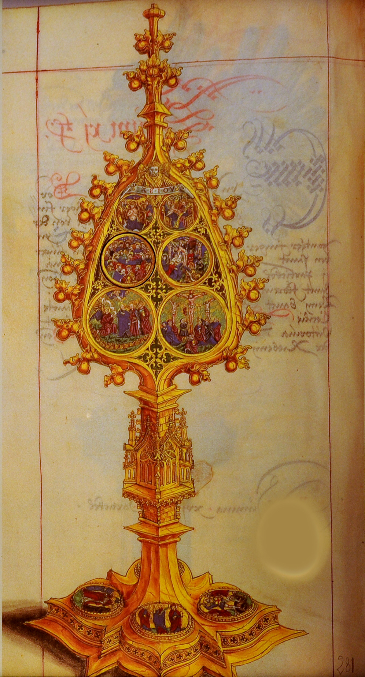 Nicht erhaltene Monstranz aus dem Halleschen Heiltum, aus dem Verzeichnis in Aschaffenburg